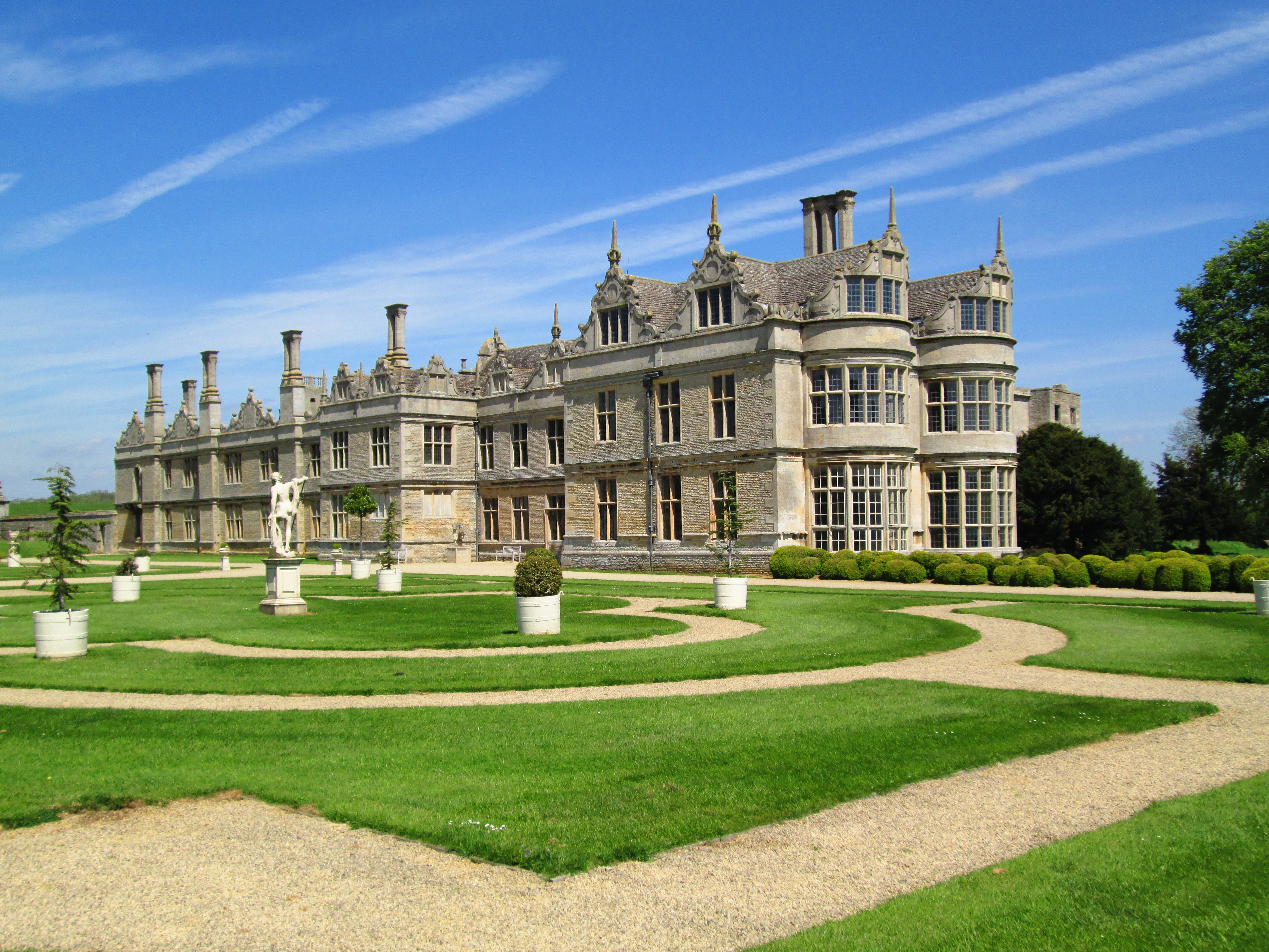 Gretton, UK